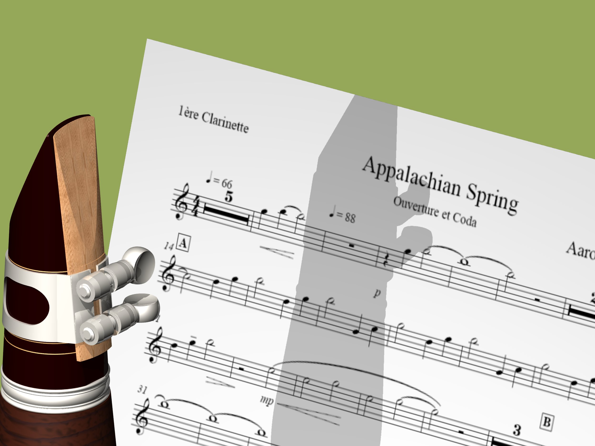 Image de synthèse représentant une clarinette devant une partition.